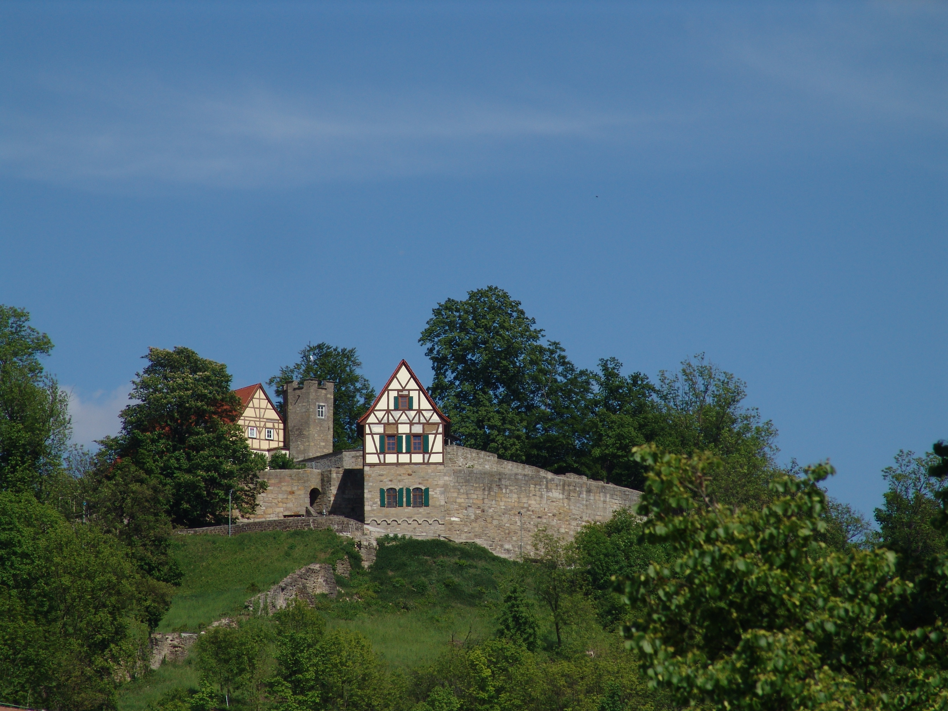 Burg Königsberg